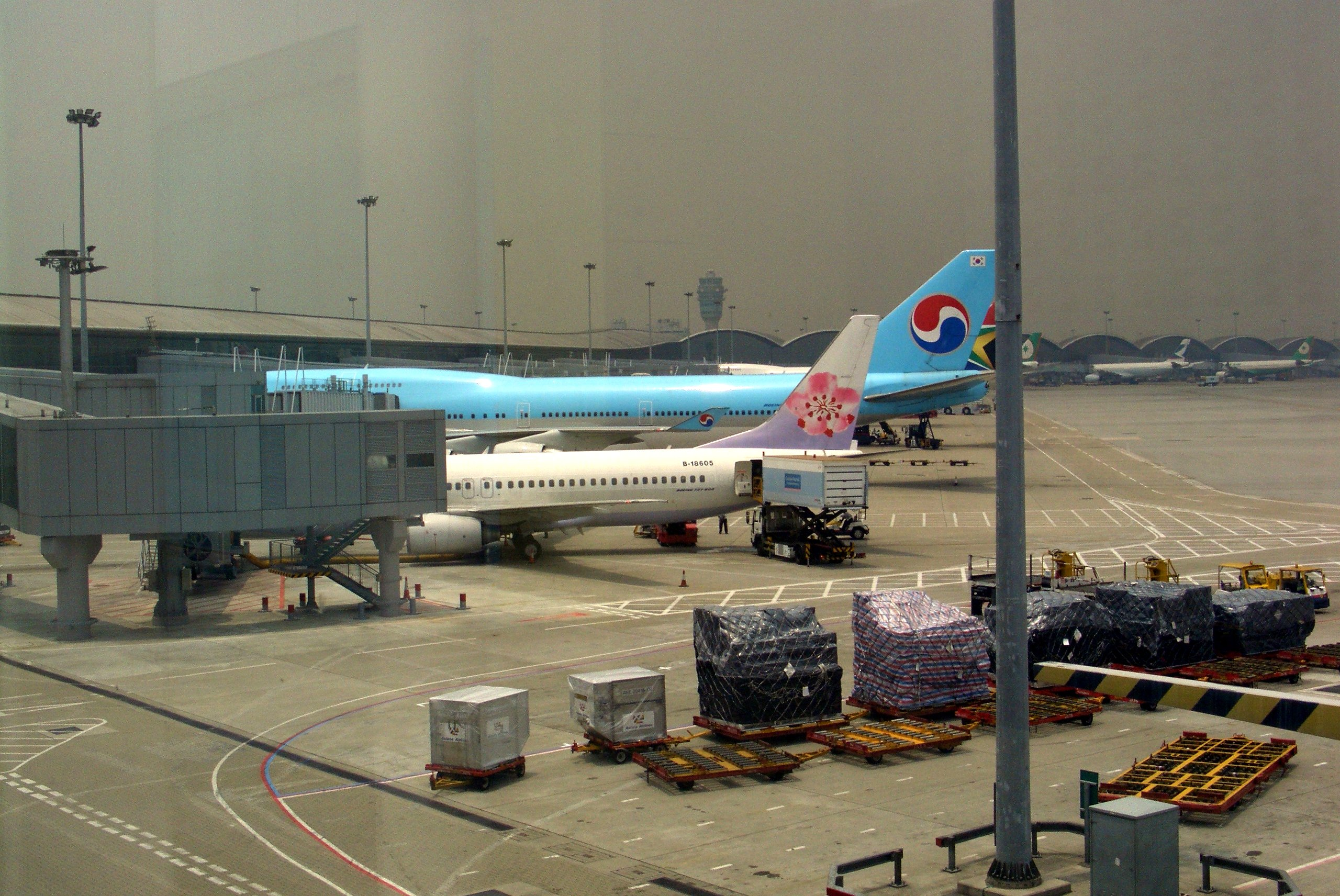 Summary Pesawat di Bandara Internasional HK Licensing